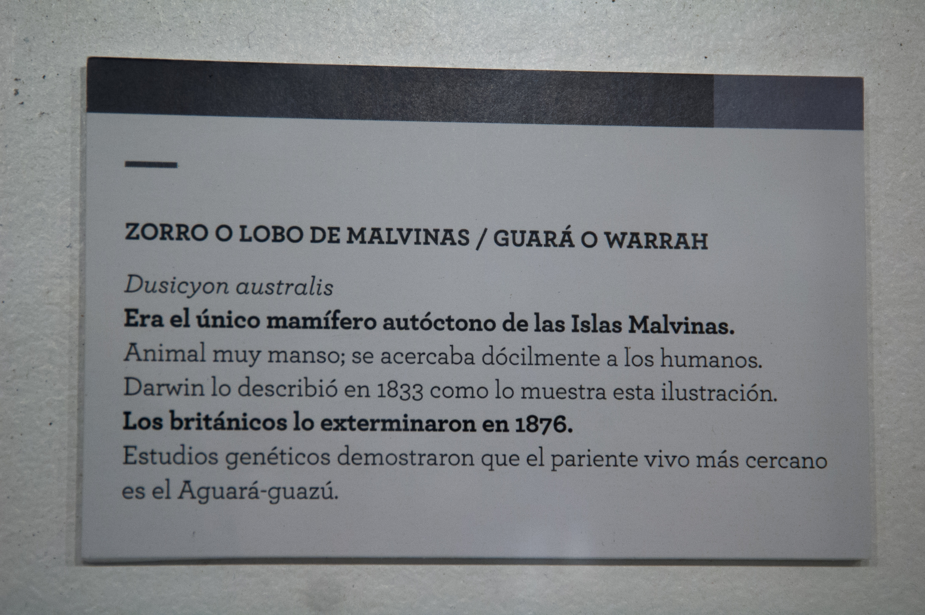 museo malvinas 033 Dusicyon australis